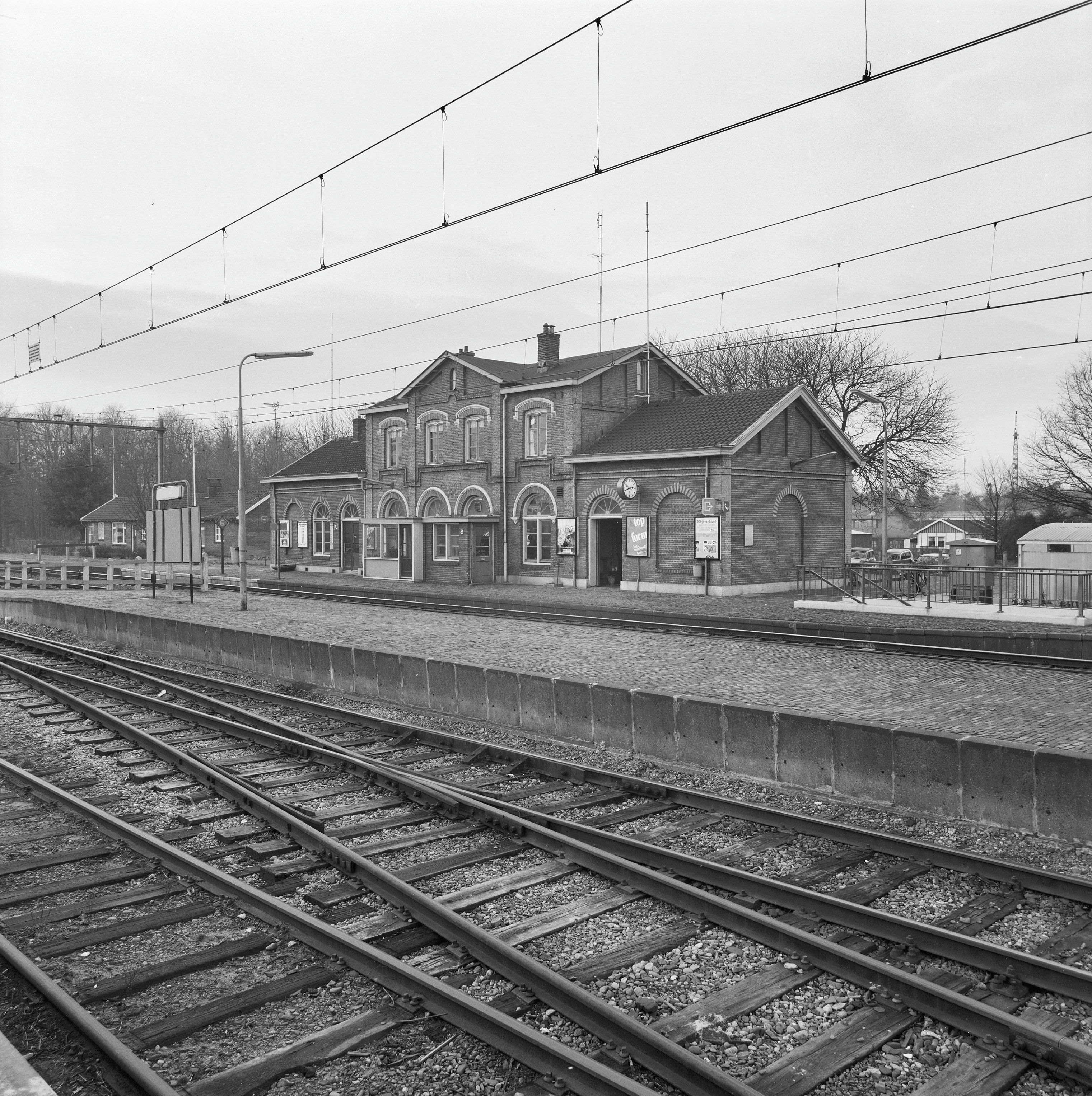 Station N.S.: overzicht perronzijde